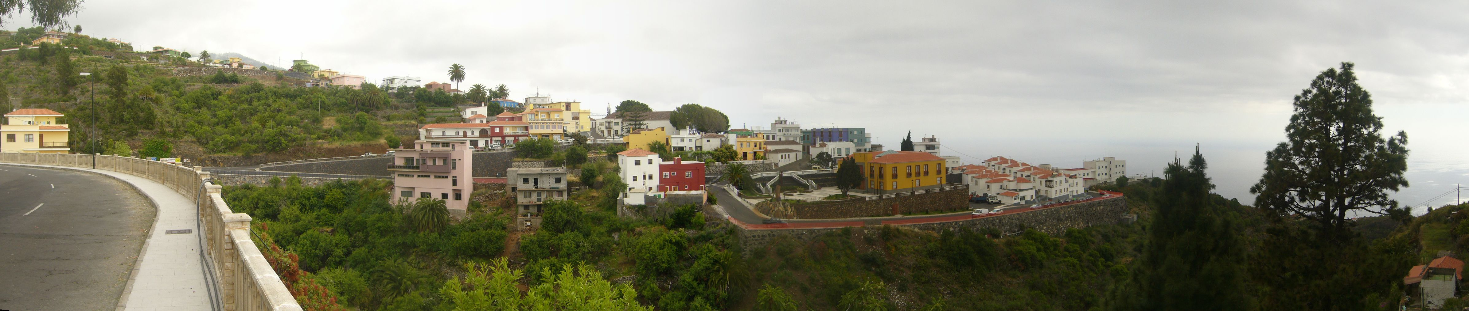 Panóramica de Tijarafe